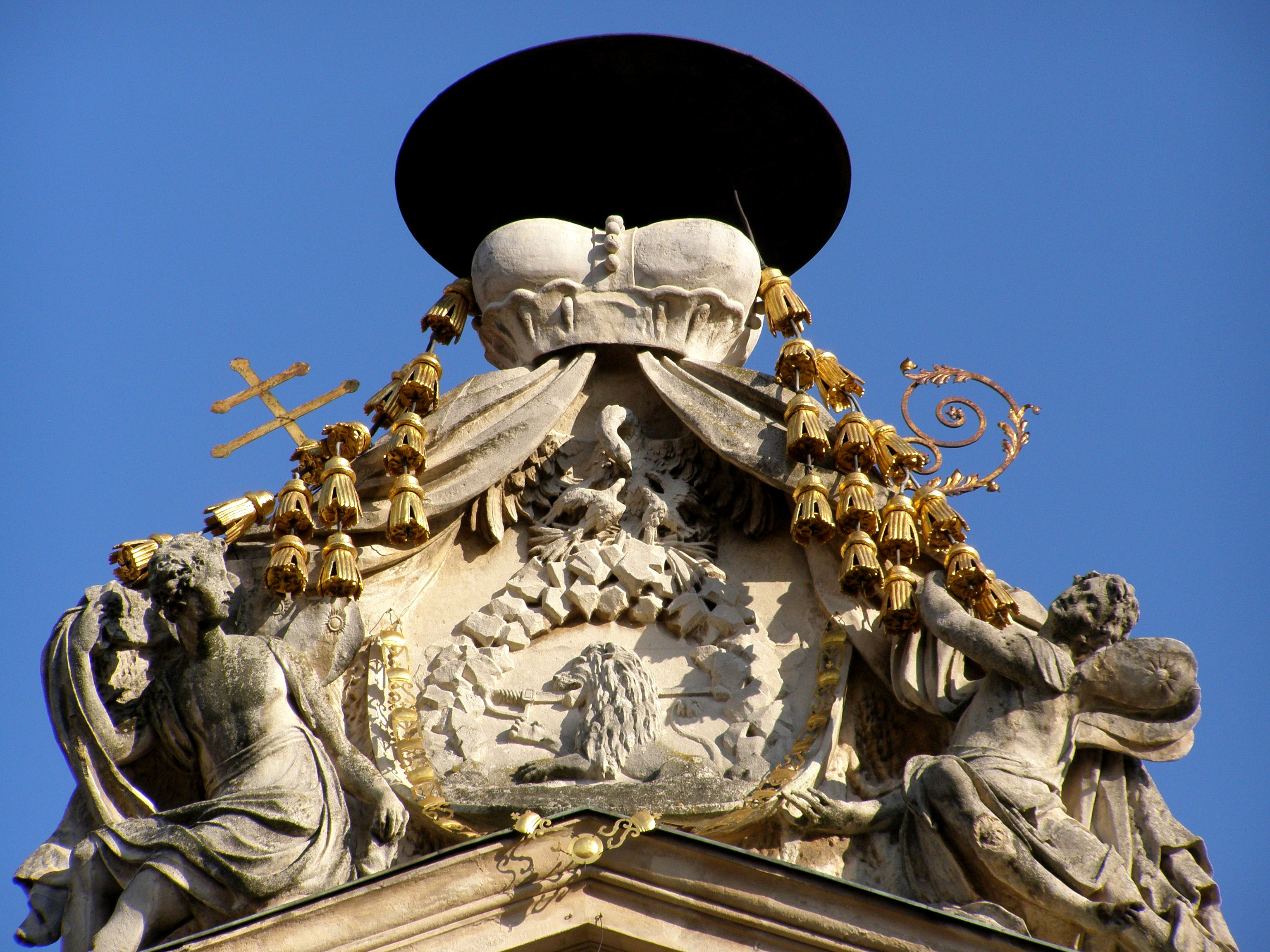 Detail kamenného erbu arcibiskupa Jozefa Baťána nad tympanónom